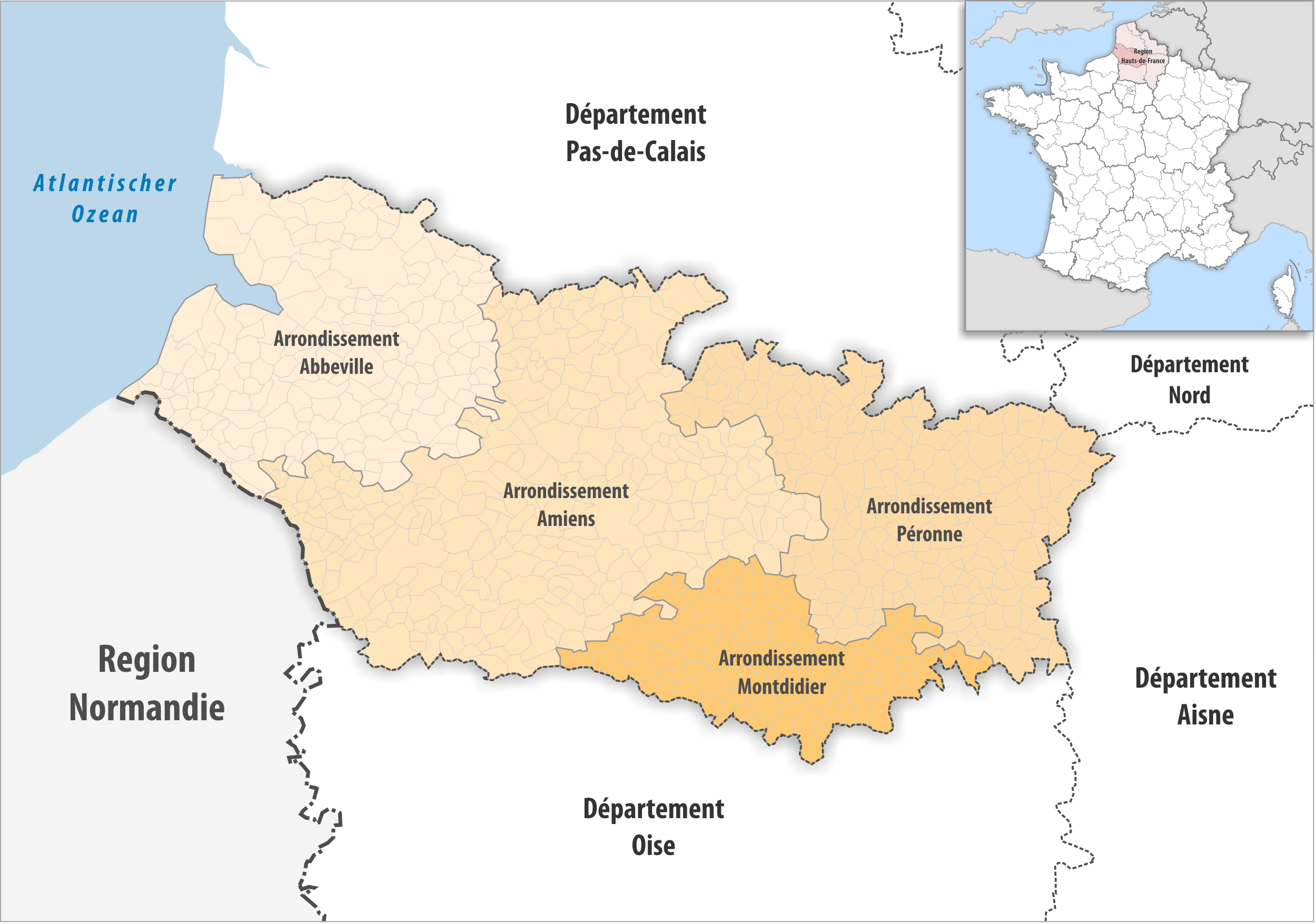 Gemeinden und Arrondissemente im Departement Somme